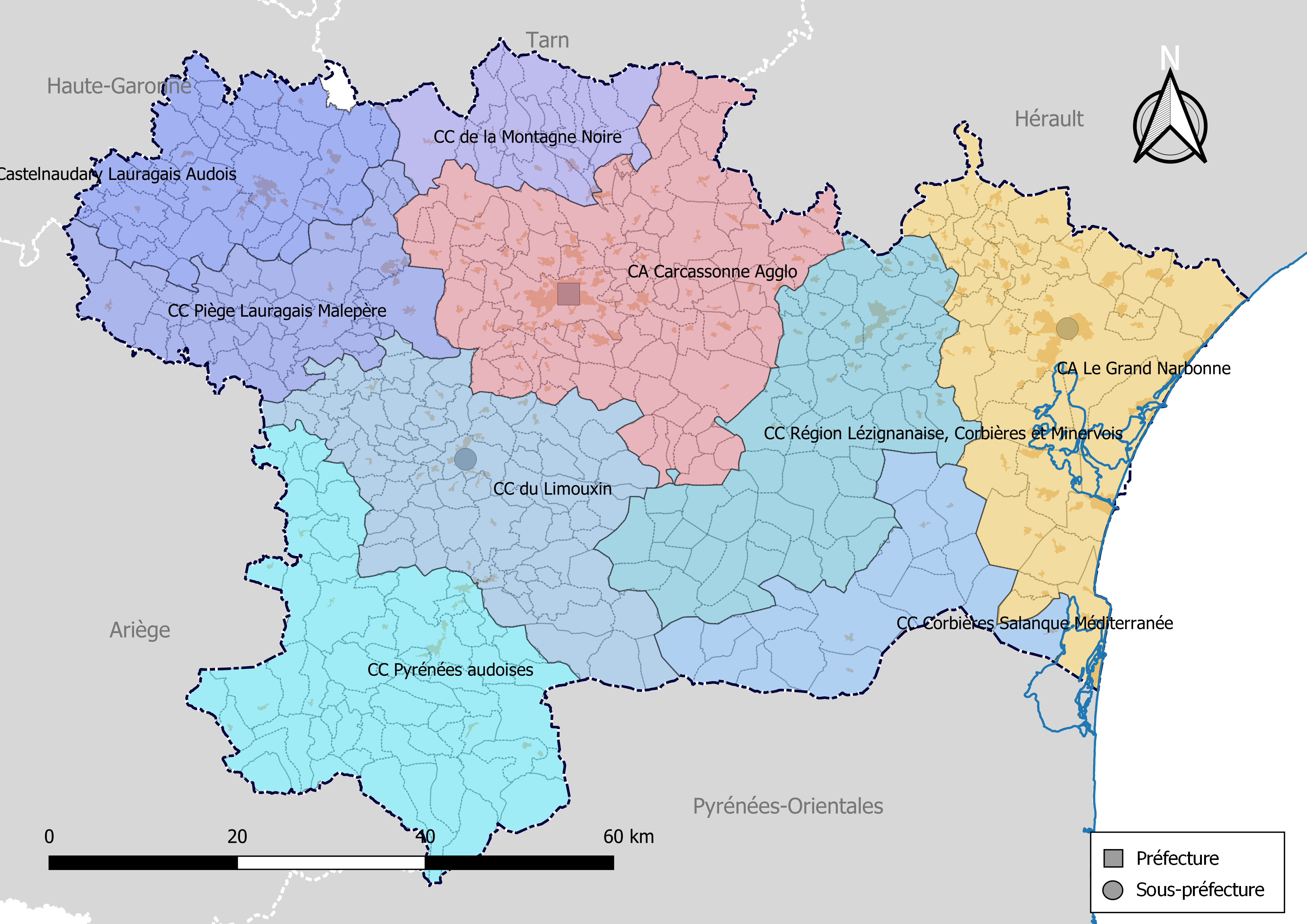 Carte des intercommunalités du département de l'Aude, France. Composition au 1er janvier 2019